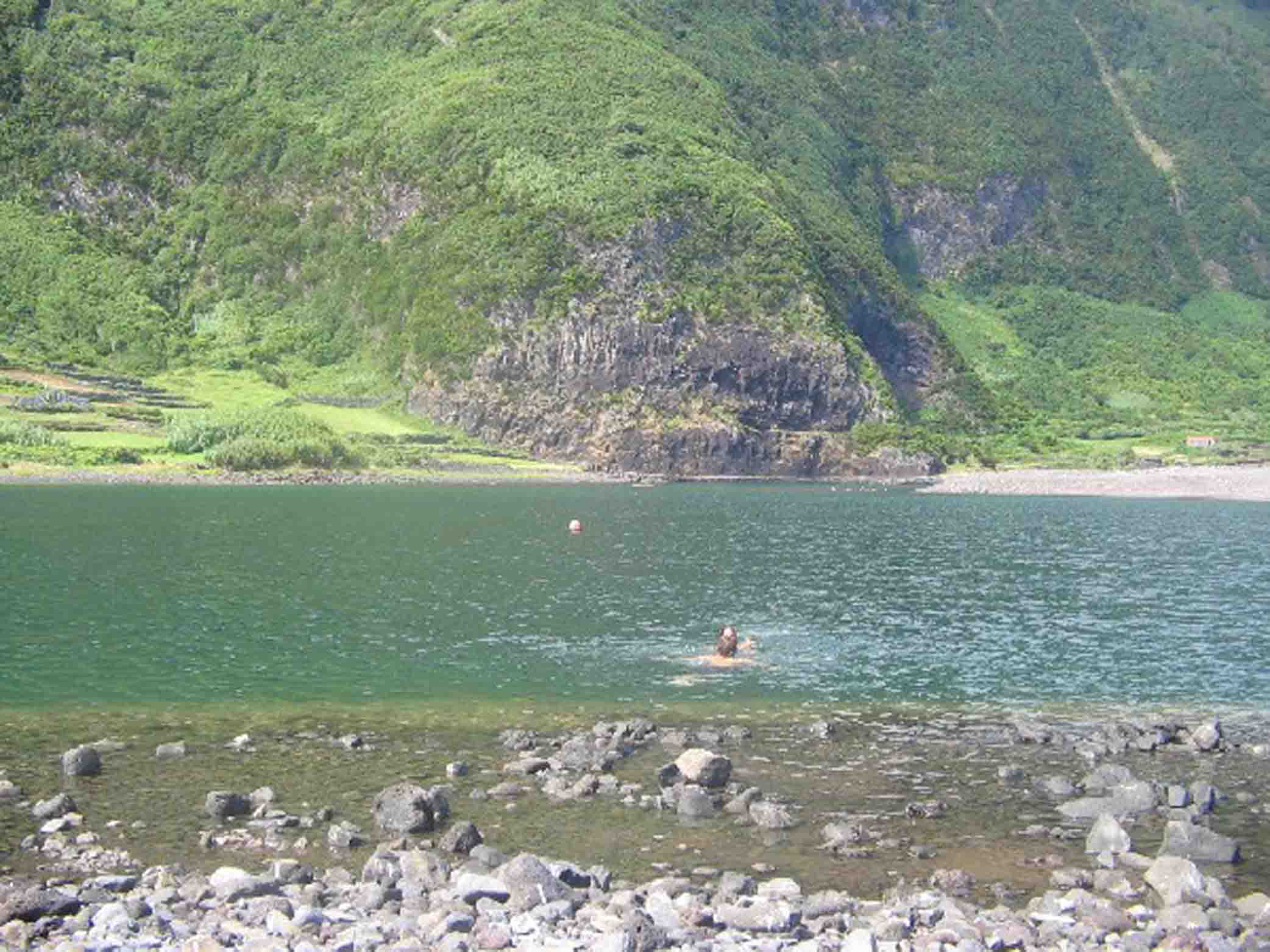 Lagoa da Fajã de Santo Cristo, ilha de São Jorge, Açores, Portugal.